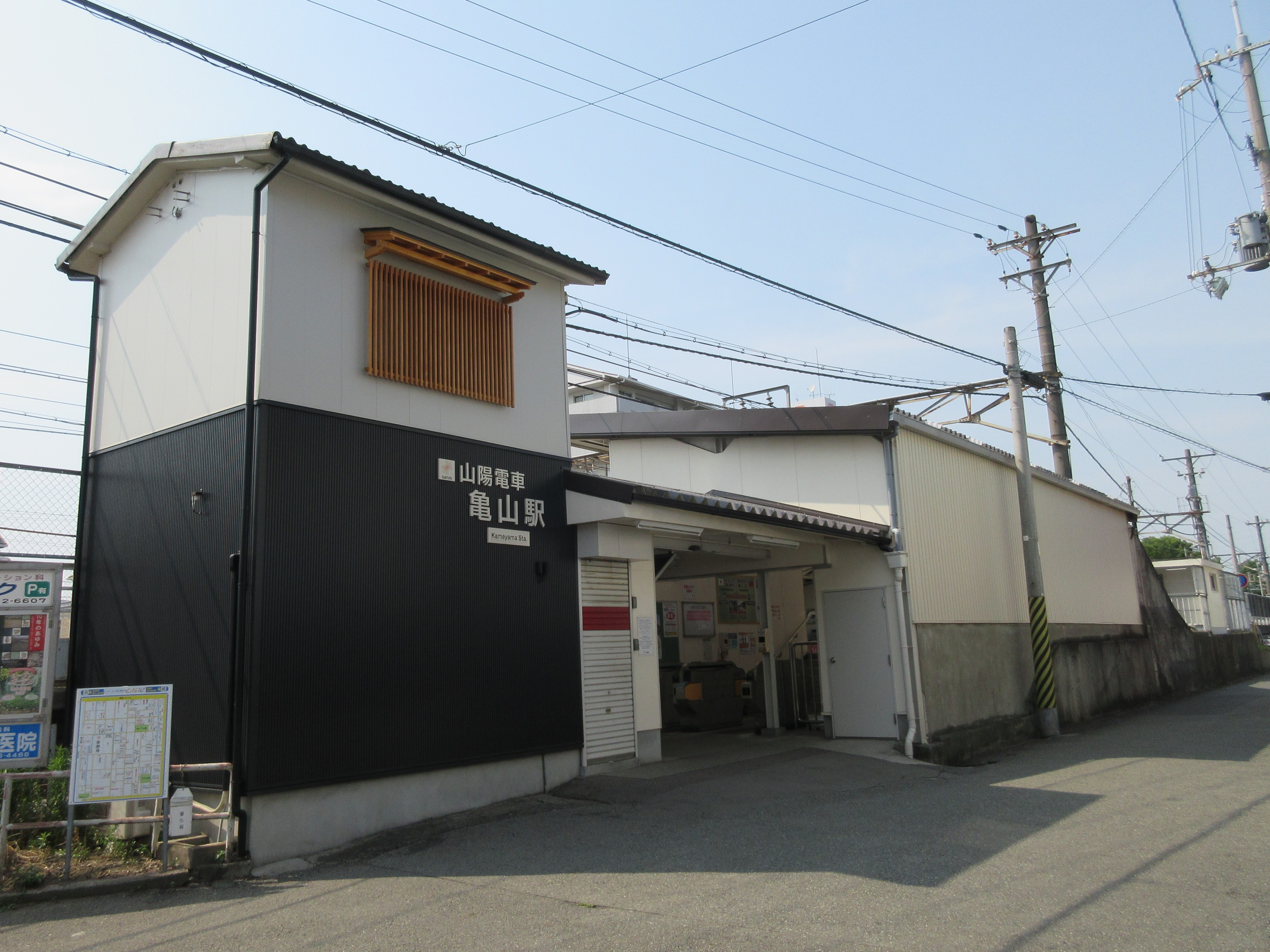 山陽電鉄亀山駅